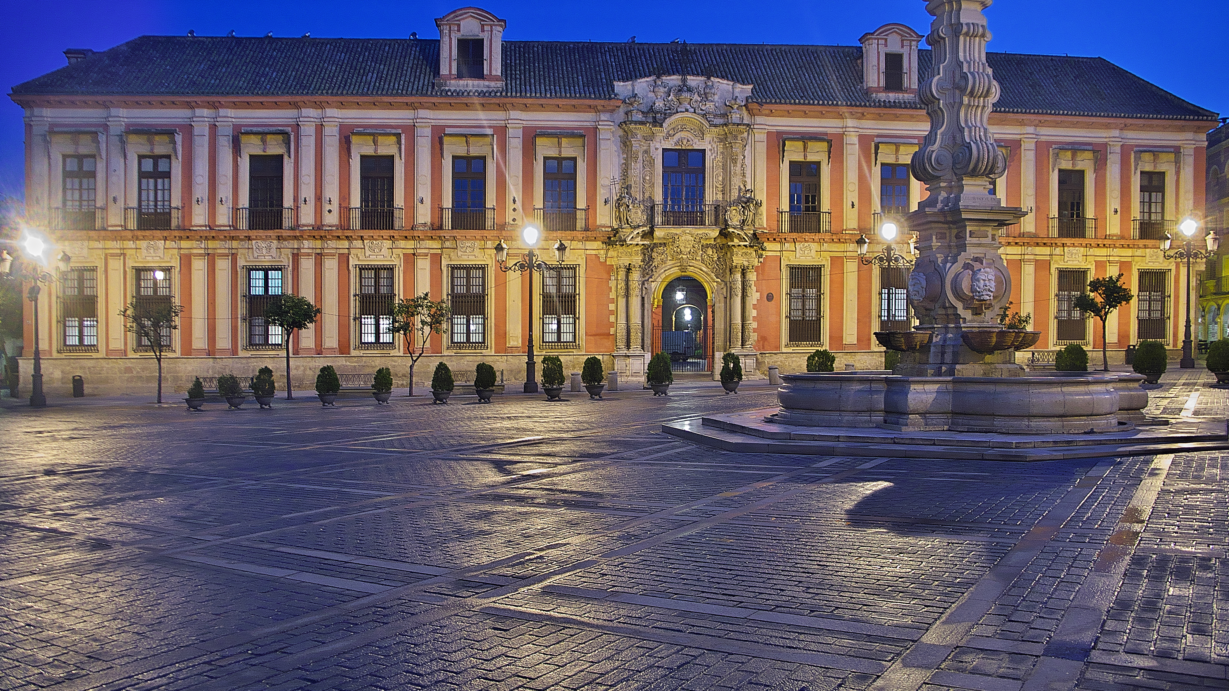 Fachada principal del Palacio arzobispal de Sevilla, (España). Obra del Maestro Mayor del Arzobispado, don Pedro Romero (1699). Colaboran los canteros, Francisco Gómez Septier y Antonio Gil Gataón.